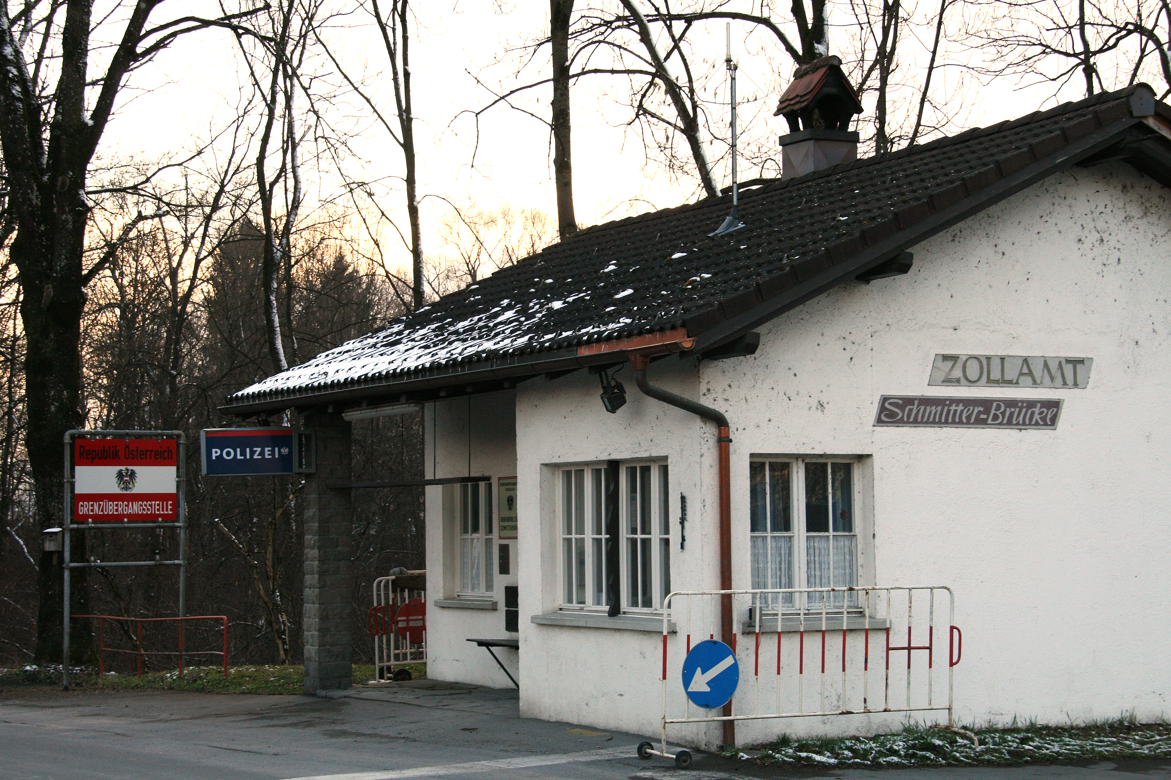 Zollamt Schmitterbrücke, Grenzübertritt Lustenau in die Schweiz Diepoldsau